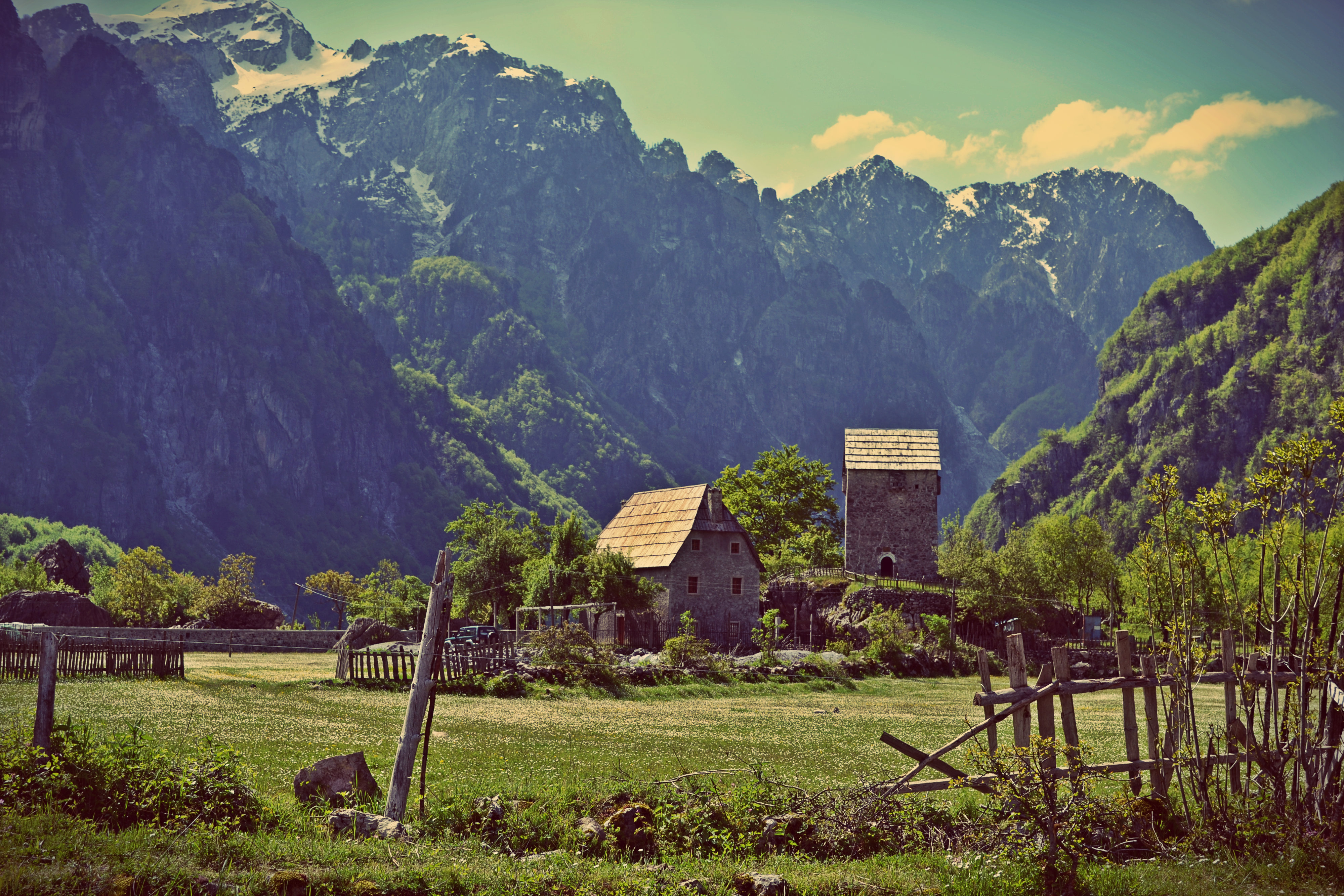 Kulla e Ngujimit ndërtuar në Theth, Dukagjin është tipike e kësaj zone. Një fortesë e ndërtuar në fund të fshatit dhe që përdorej nga i gjithë fshati. Ishte banesa e atyre familjeve që për arsye gjakmarrje detyroheshin të mbylleshin aty (gjithë meshkujt mbi moshën 14 vjeç). Vetëm gratë e shtëpisë ishin të lira të dilnin e të punonin pak tokë para kullës. Sot kulla është e vizitueshme dhe ndodhet në një zonë me vlera të medha turistike. Gjendet në jug të fshatit Theth dhe shumë pranë të lumit të Shalës.